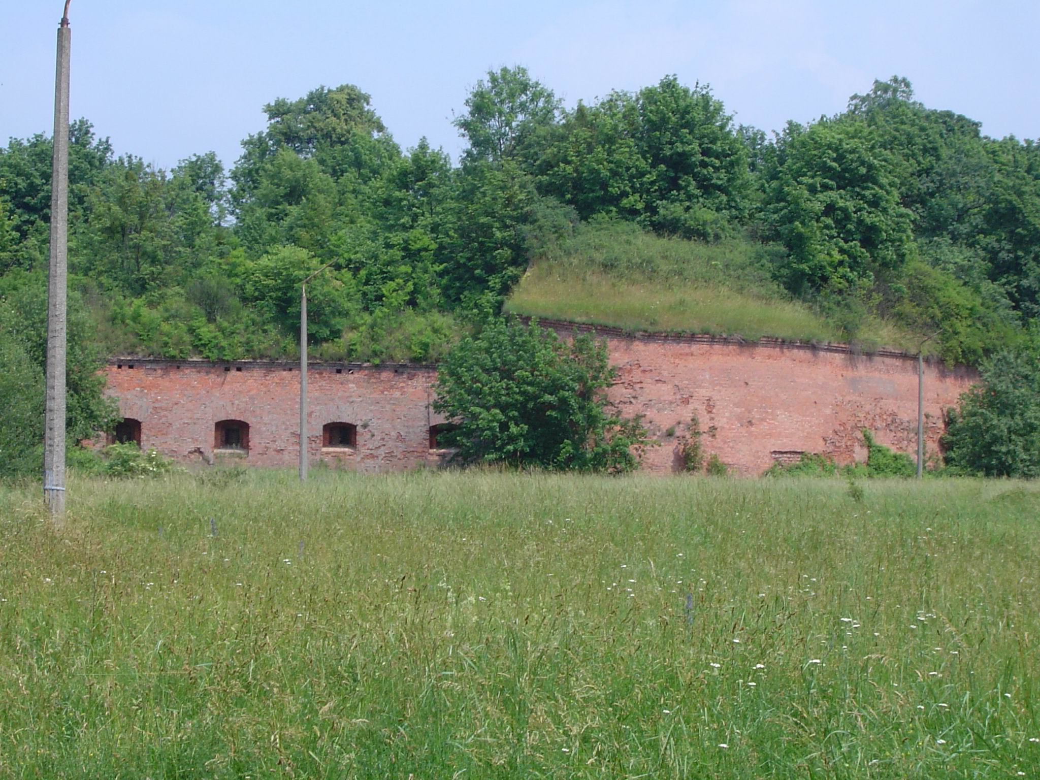 Grudziądz - Twierdza Grudziądz, cytadela (zabytek nr 597) Fortifications of Cytadela in Grudziądz